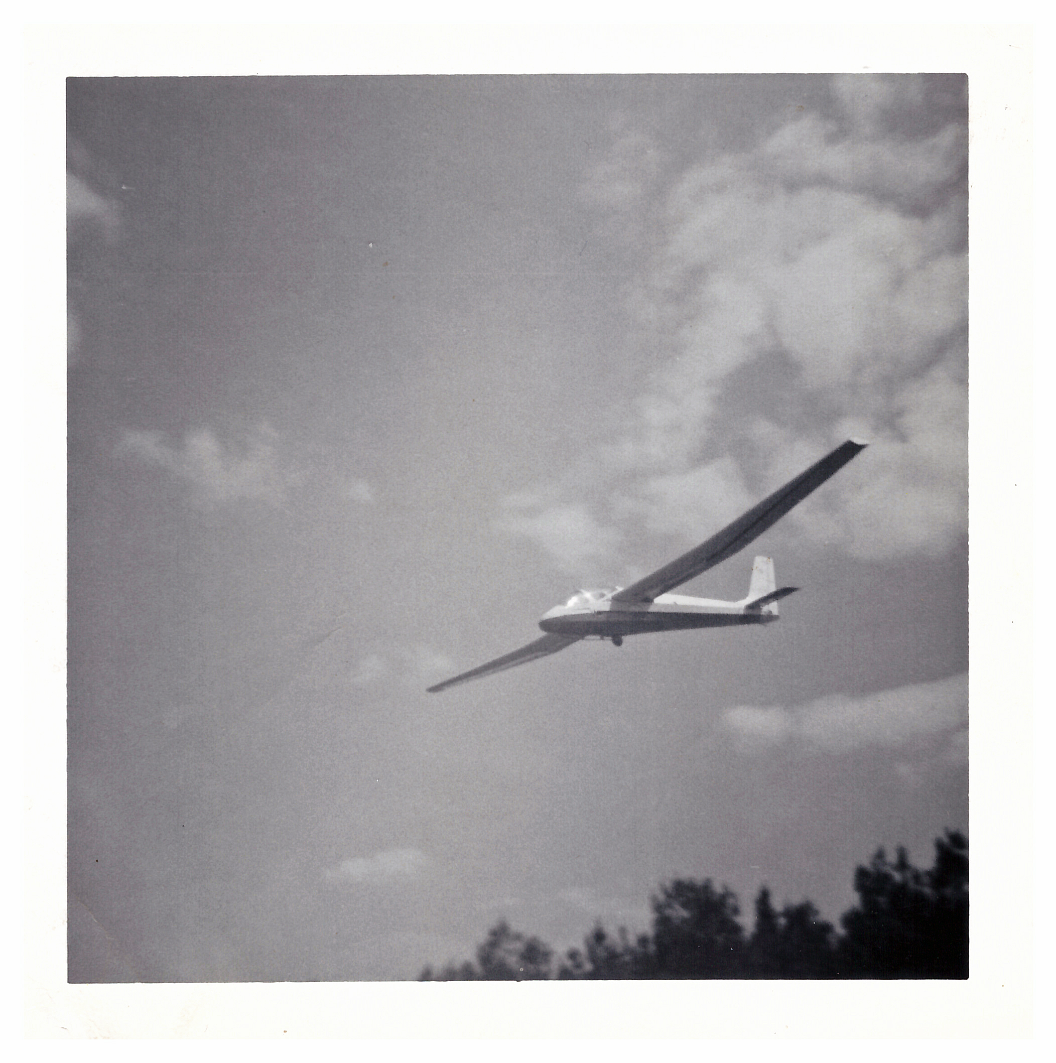 Wassmer WA-30 Bijave en finale sur le terrain de Bordeaux-Saucats